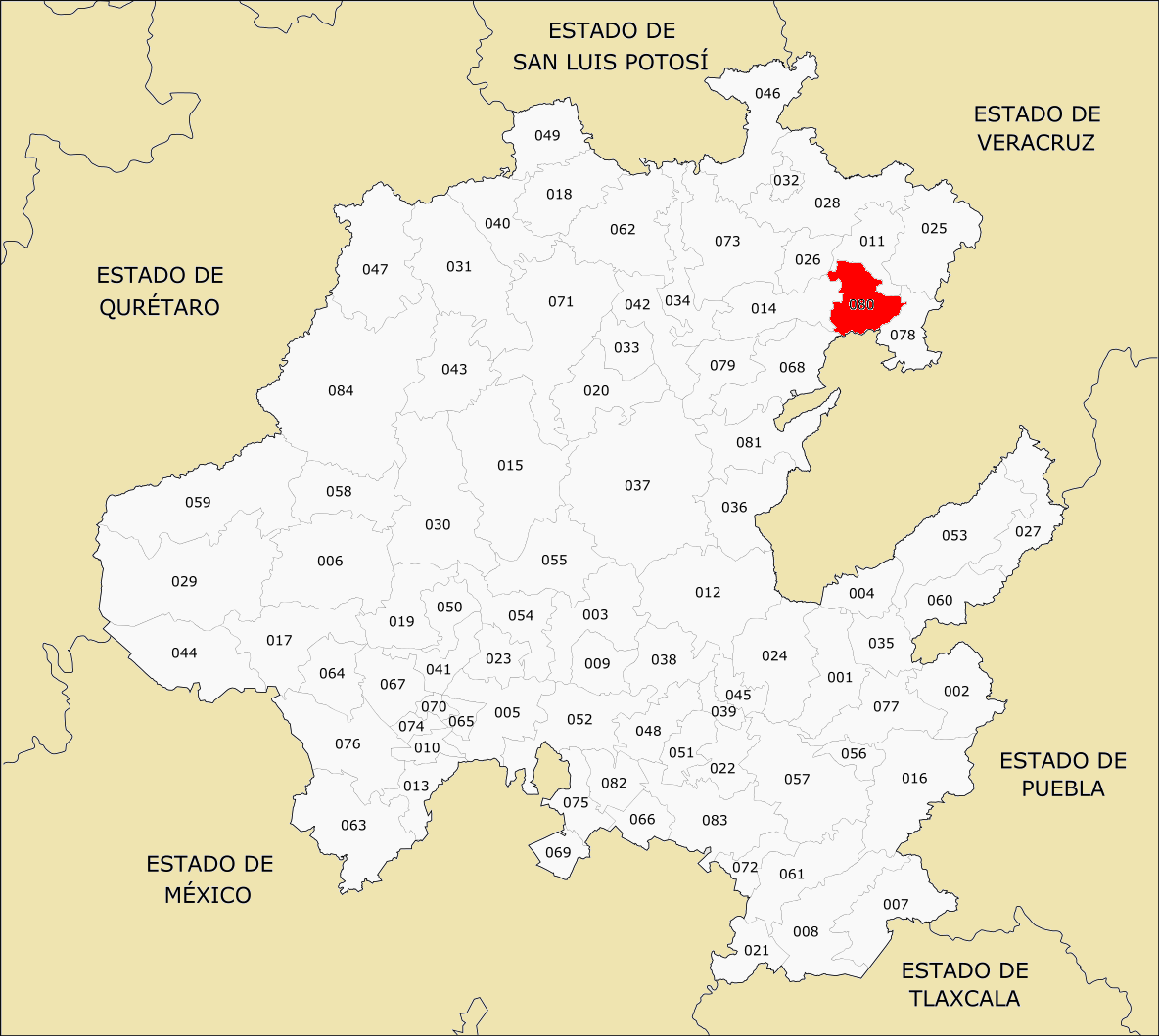 Municipios de Hidalgo